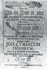 Buchtitel